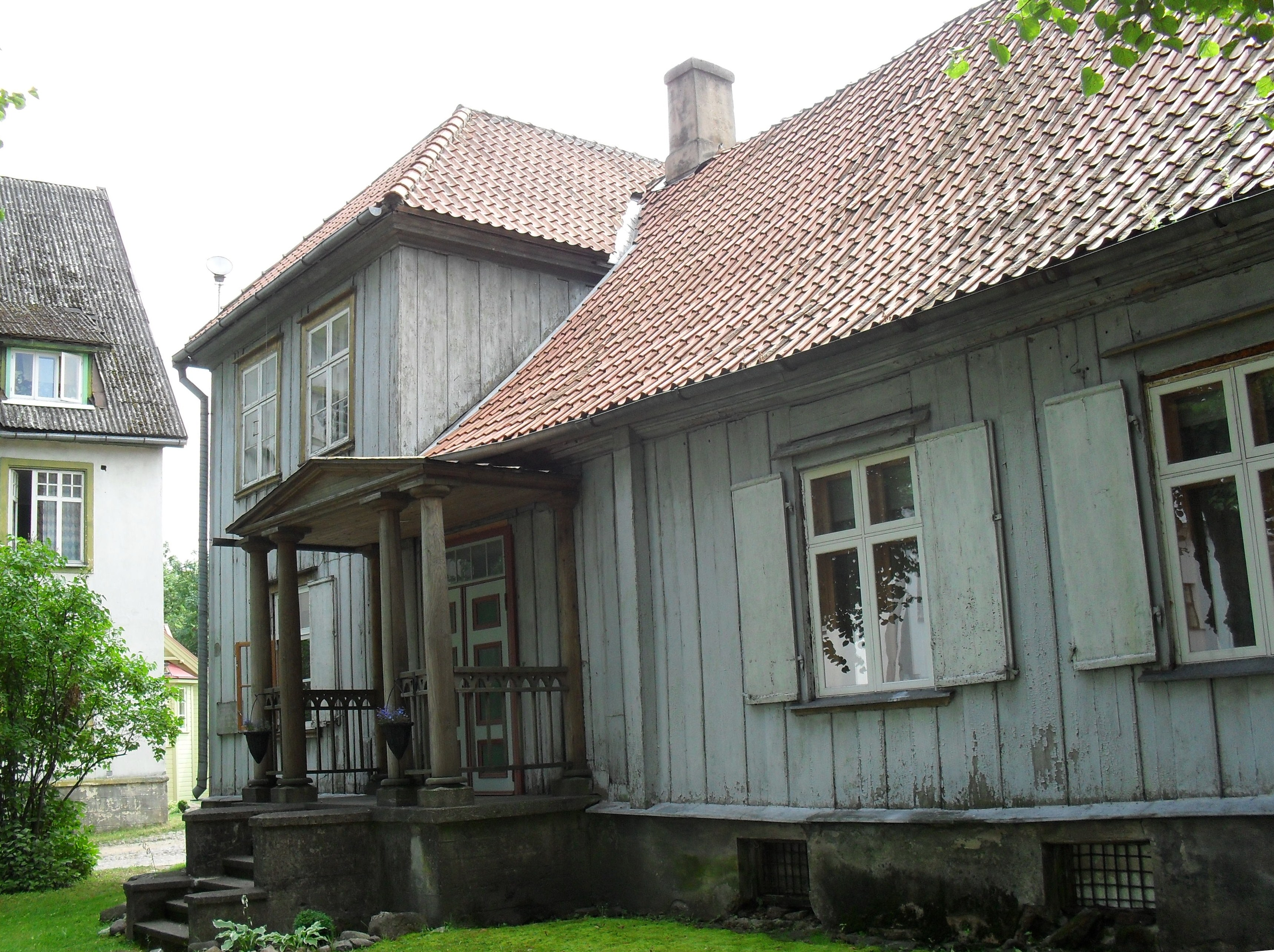 Maja, kus aastatel 1862-1924 elas Friedrich Kuhlbars